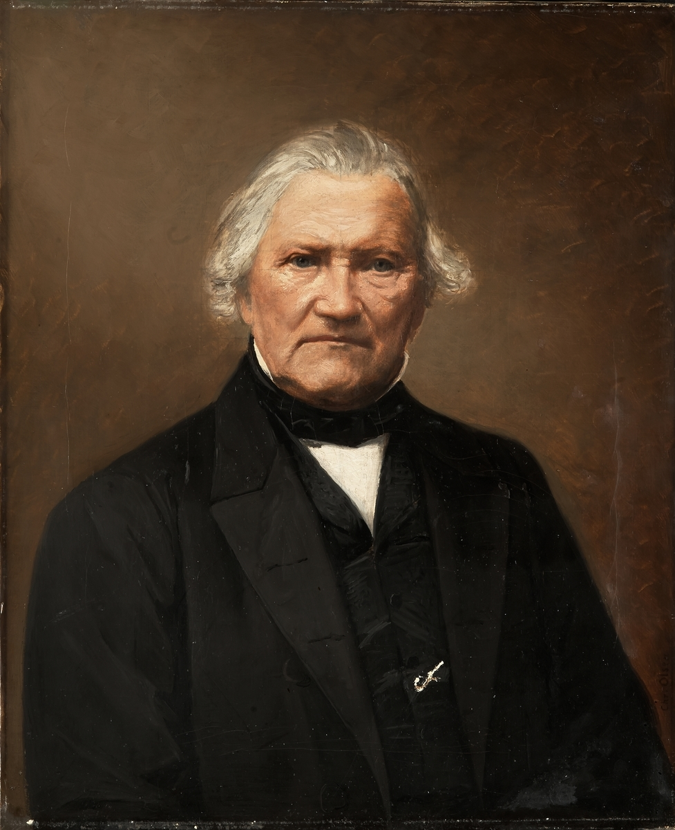 Portrett av grosserer Hans Gulbranson